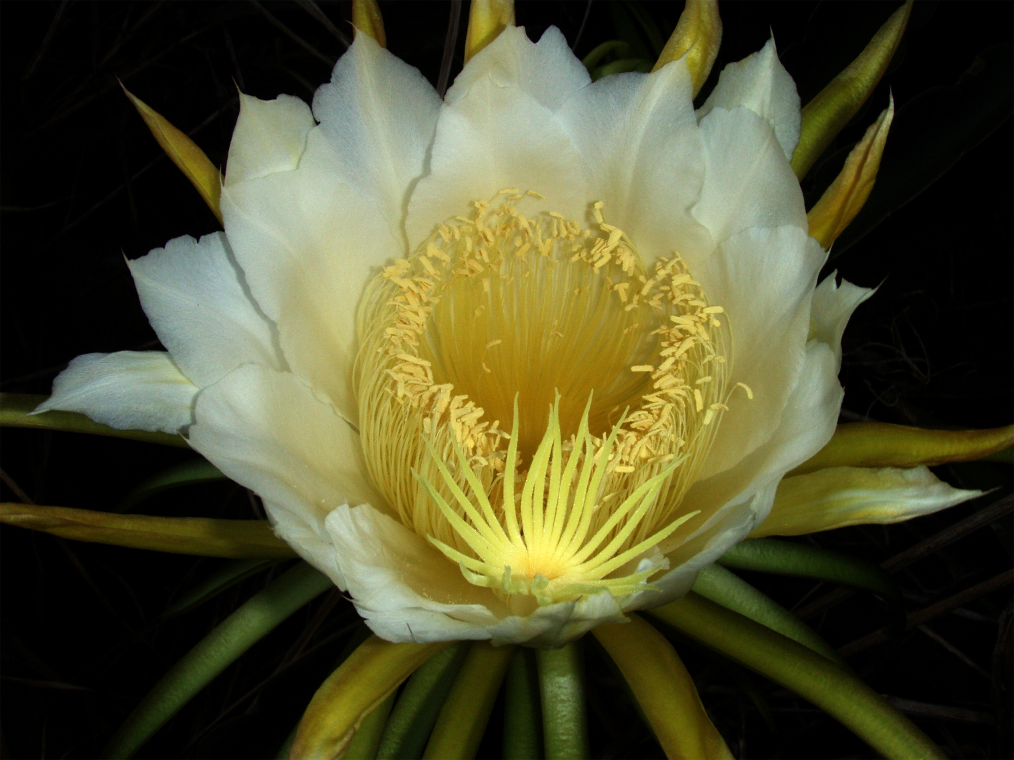 Hylocereus undatus. Night-blooming cereus, paniniokapunahoa, papipi pua (Cactaceae)